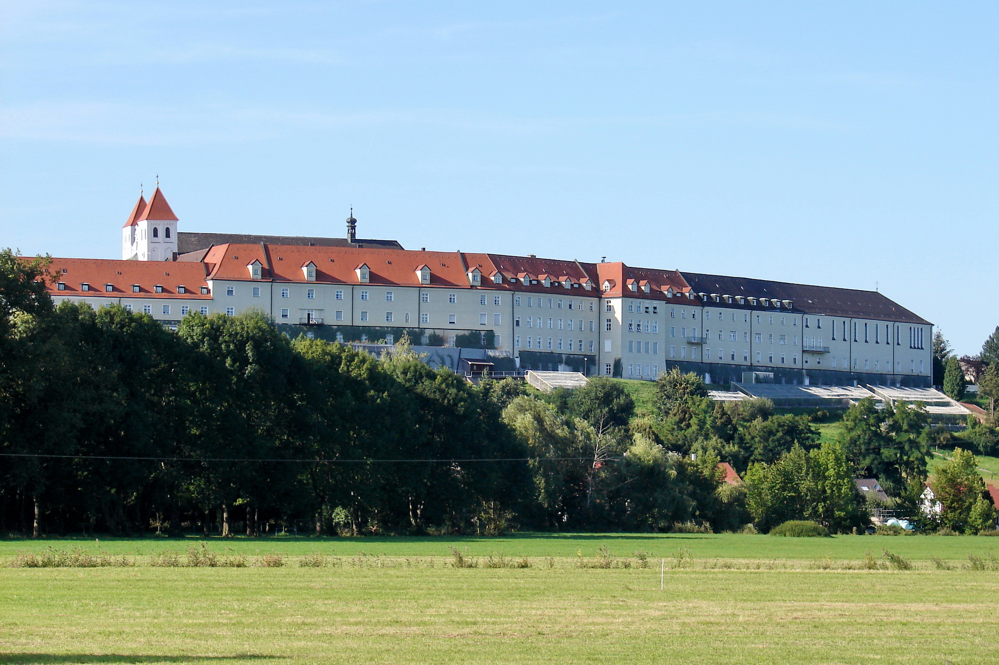 Das Franziskanerinnenkloster Mallersdorf, das eine Klosterrealschule betreibt, liegt auf einer Anhöhe über dem idyllischen Labertal. Der Orden der Armen Franziskanerinnen von der Heiligen Familie wurde von Paul Josef Nardini gegründet.